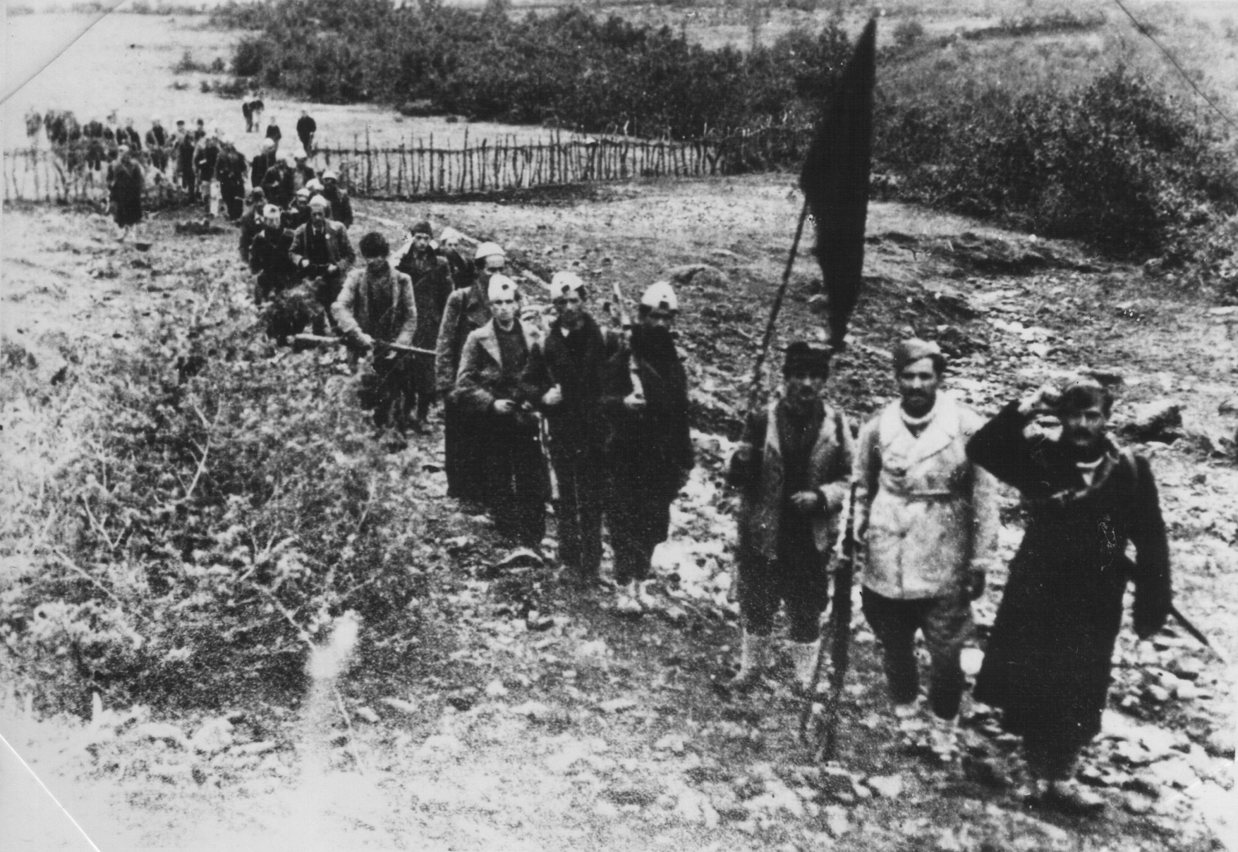 Srpskohrvatski / српскохрватски: Bataljon Bajram Curi u Malesiji krajem 1943.